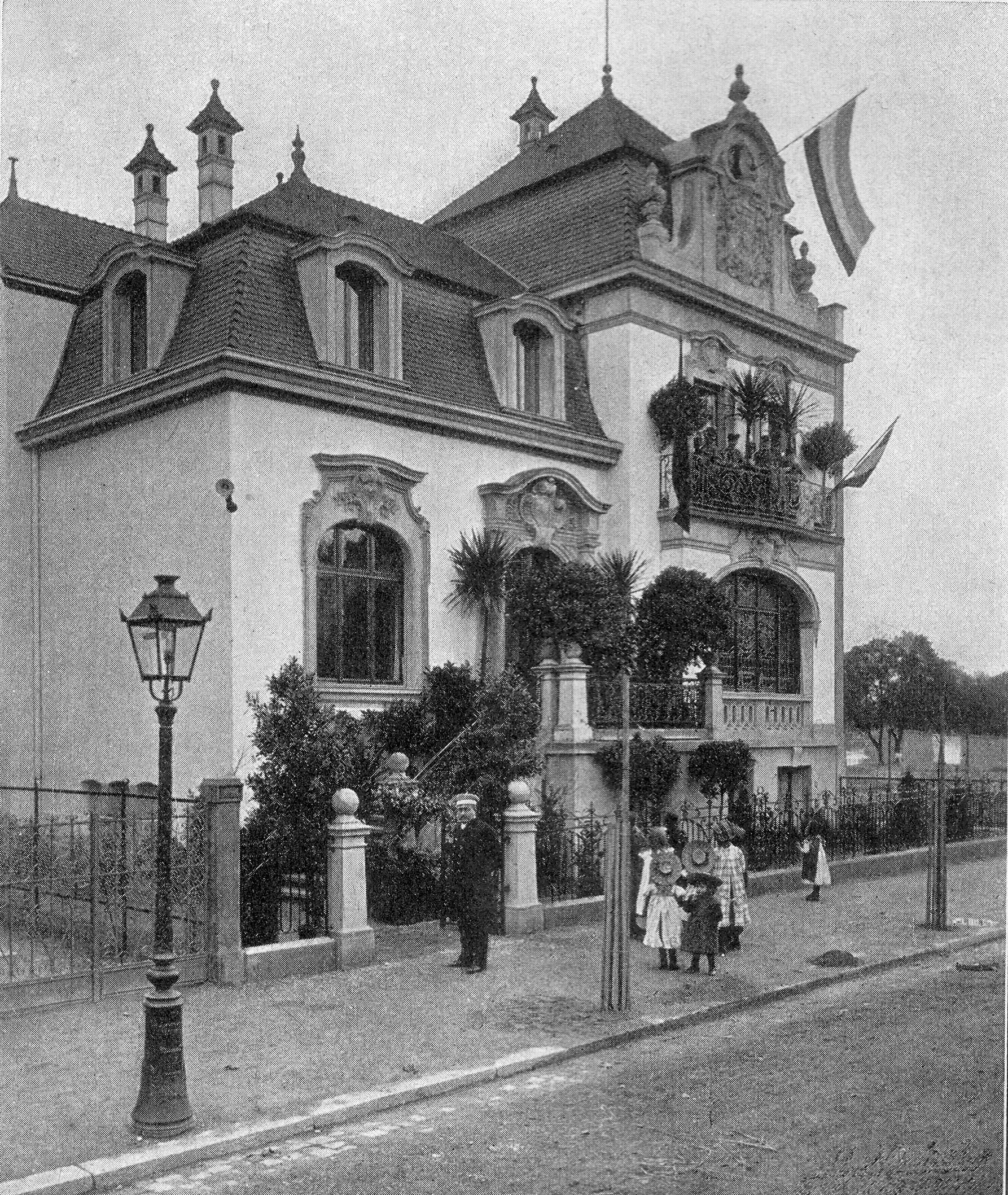 Corpshaus der Rhenania Straßburg, Straßburg, Lessingstraße 19 (Heute „rue Erckmann Chatrian”); abgerissen 1973 und durch ein Appartmenthaus ersetzt [1]